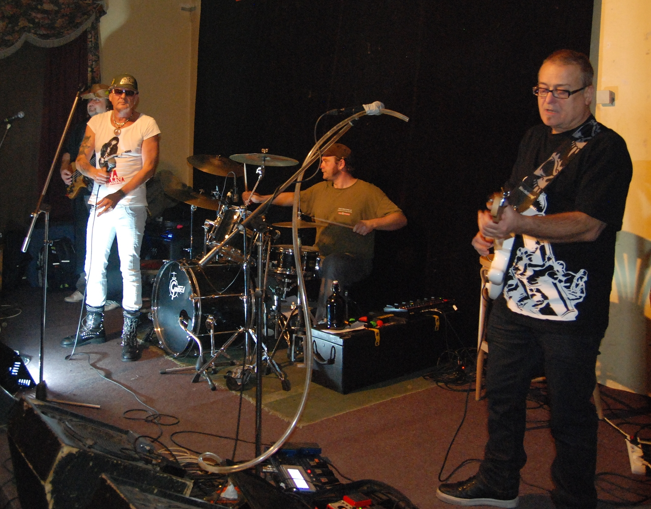 Koncert skupiny Abraxas v restauraci Na slamníku